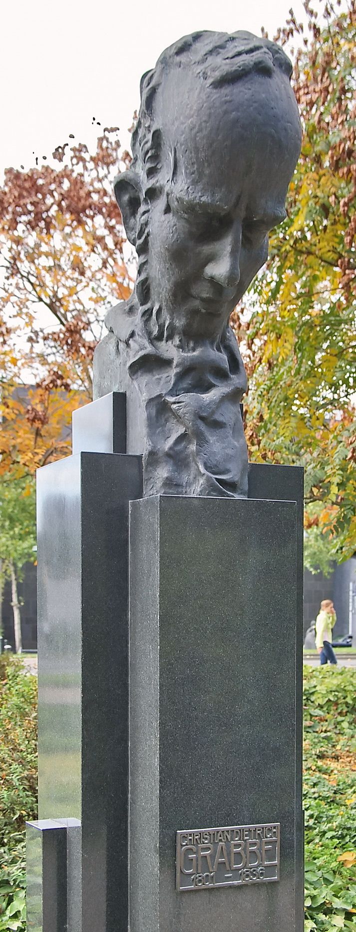 Büste von Christian Dietrich Grabbe in Düsseldorf im Hofgarten am Grabbe-Platz , im Hintergrund Museum K20